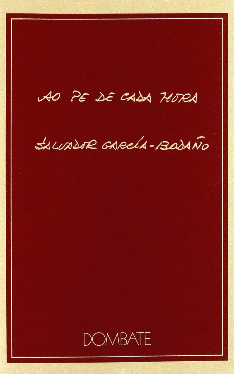 Ao pé de cada hora, 2ª ed.[1]